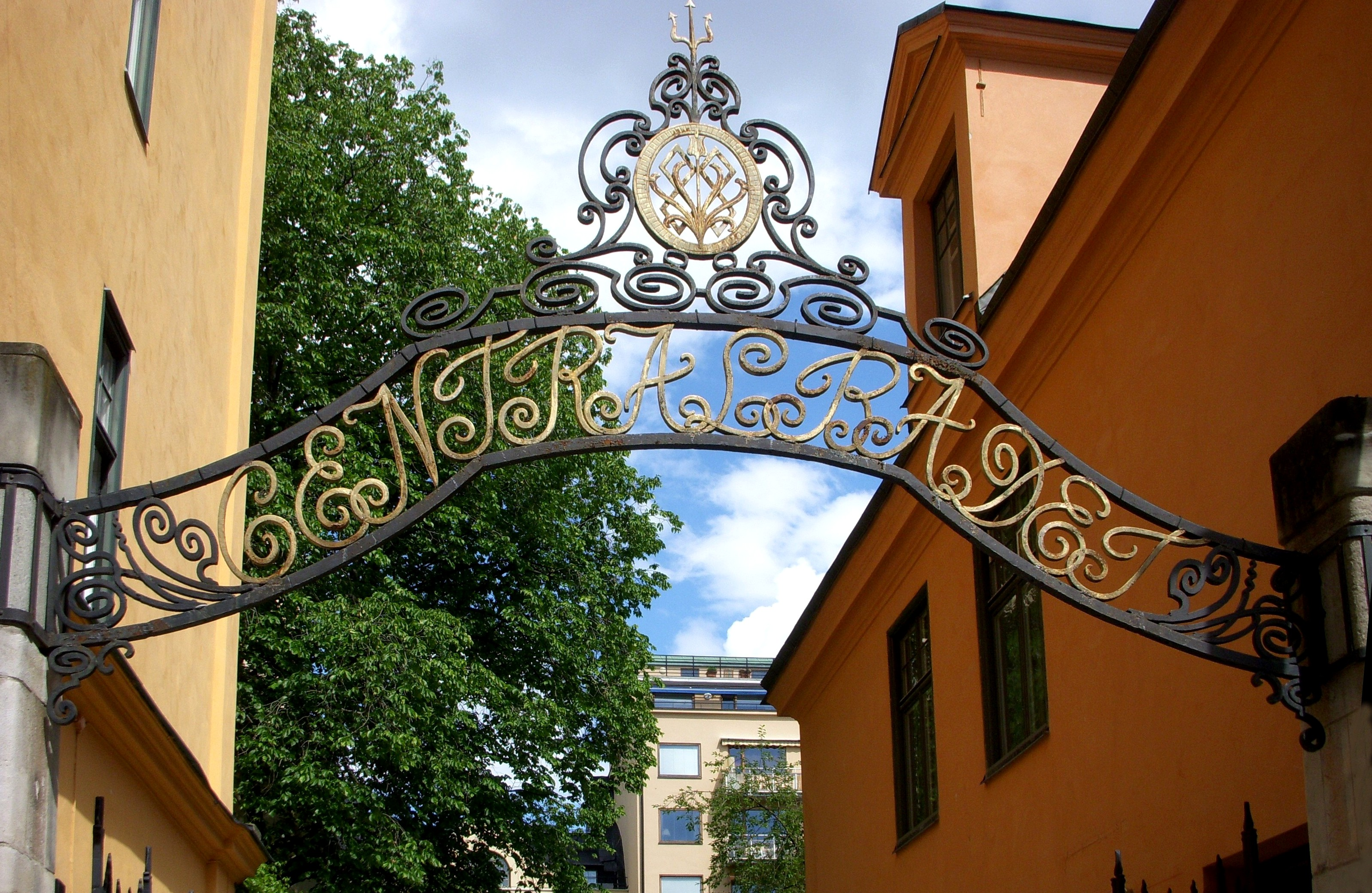 Skylt "Centralbadet" på Norrmmalm i Stockholm